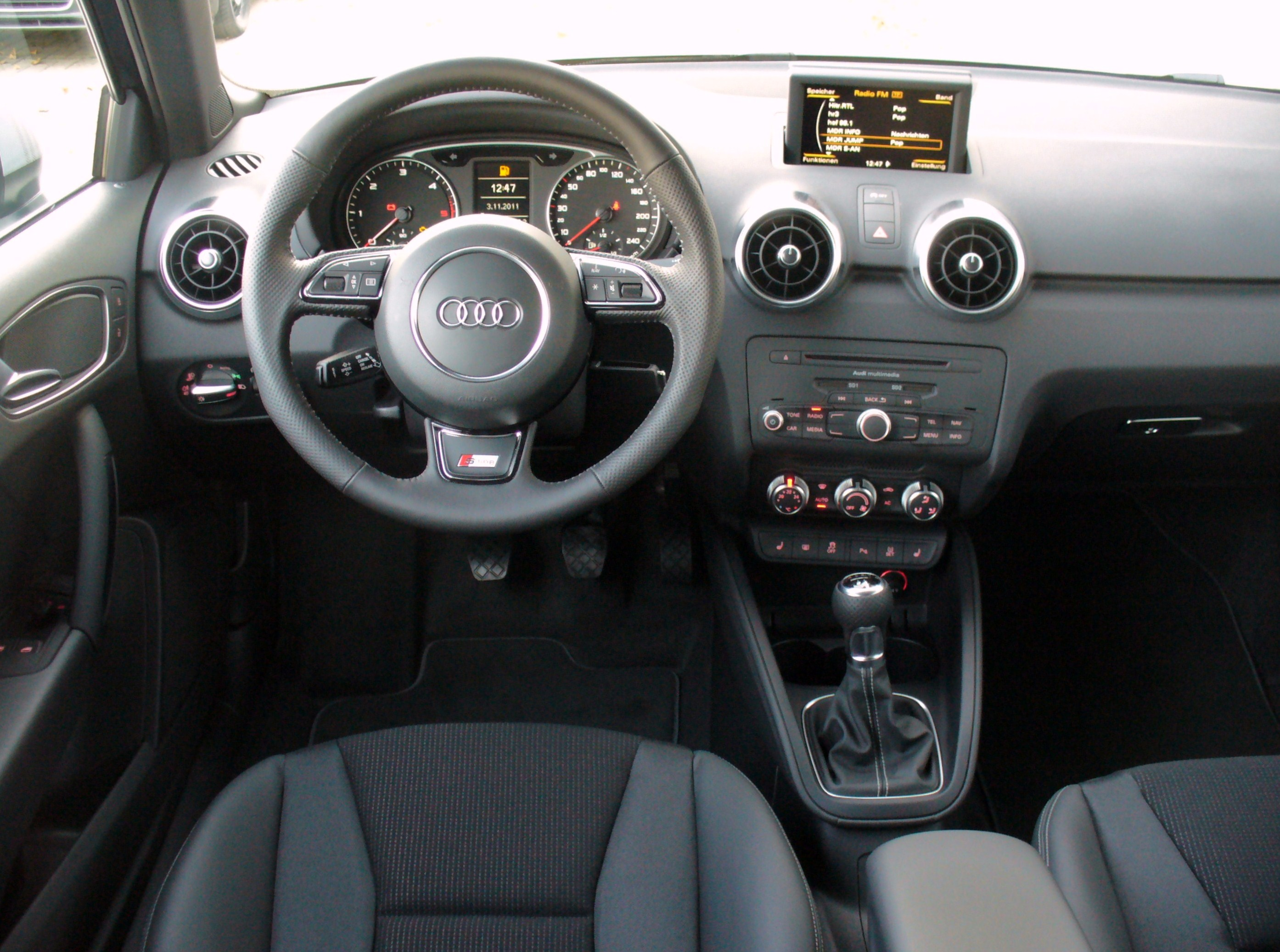 Audi A1